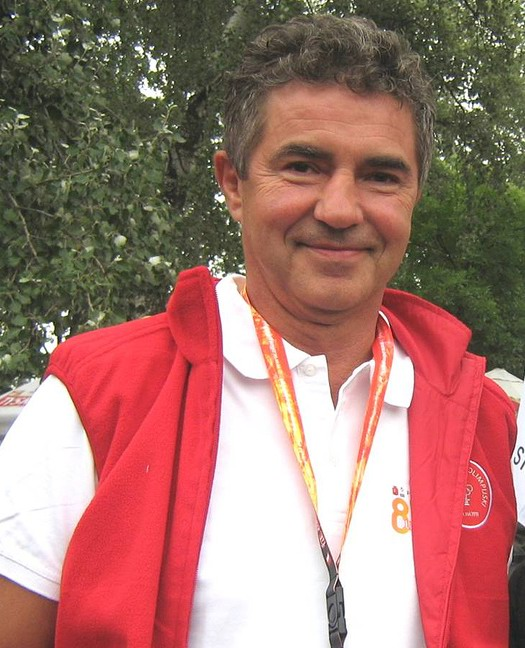 Jerzy Kaczmarek - polski szermierz, złoty medalista olimpijski